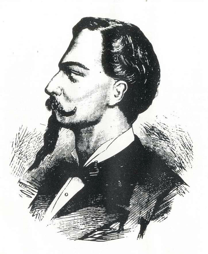 Grabado publicado en El Correo de Ultramar, 1868 y según Benigno Souza copia de un retrato de 1867, una de sus primeras imágenes